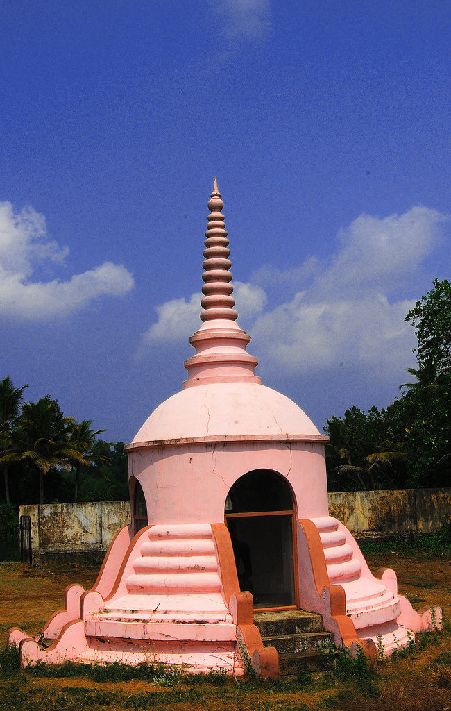 കരുമാടിക്കുട്ടൻ ക്ഷേത്രം സ്തുപം